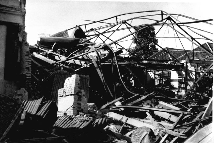 Foto. Verwoeste NIMEF-fabriek, Malang